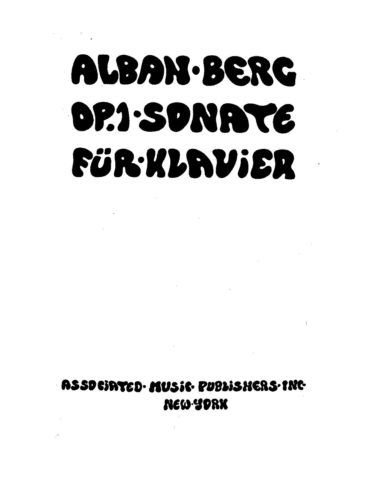 Page de titre de la partition